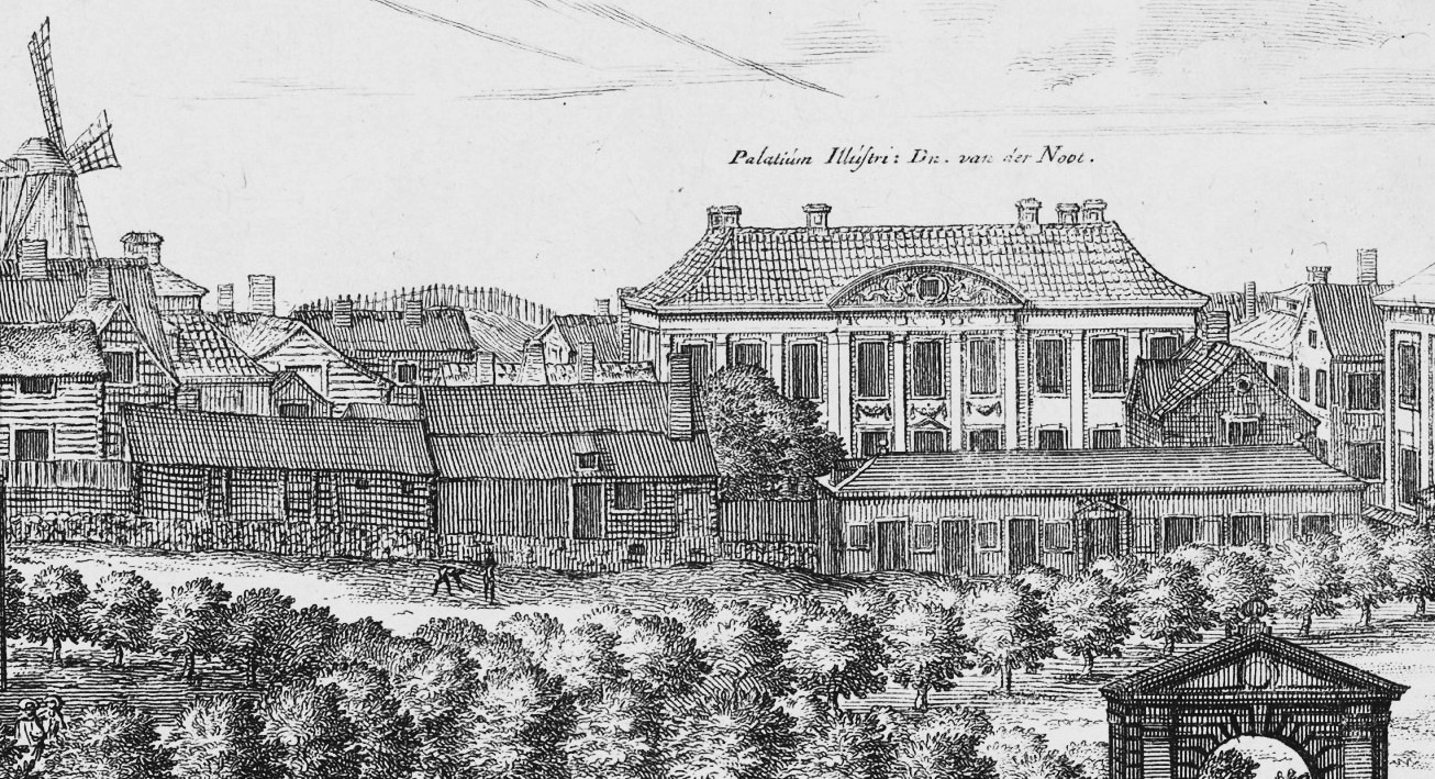 Van der Nootska palatset i Suecia antiqua et hodierna - volume 1 (bilden är beskuren)